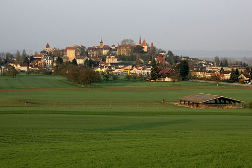 Avenches mit der gedeckten Thermes de Perret